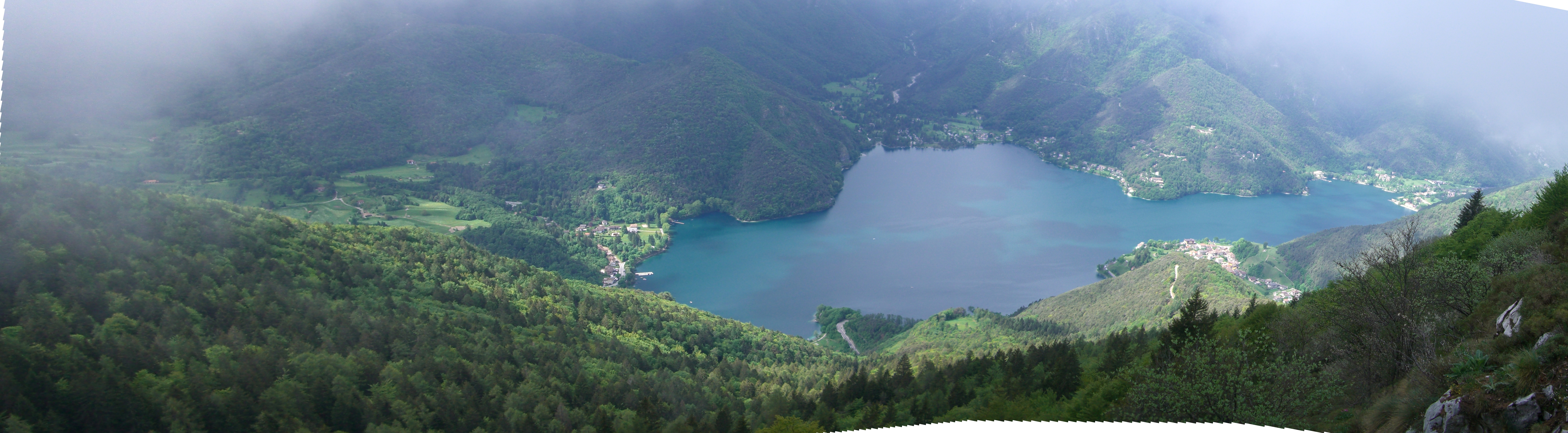 Panoramaansicht des Lago di Ledro